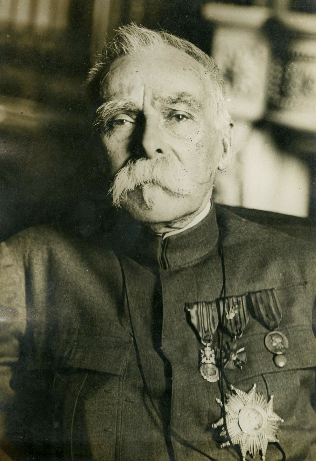 "Le Général PAU qui vient de mourir (1932)" Photo originale G. DEVRED / Agce ROL